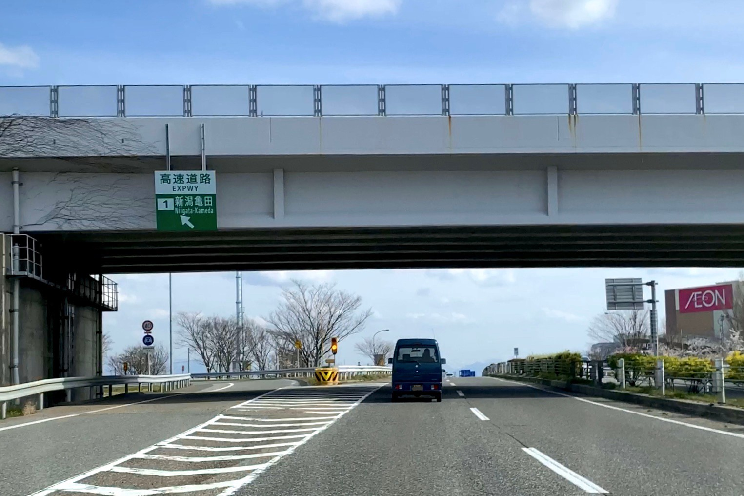 亀田バイパス・新潟亀田IC（2020年4月）